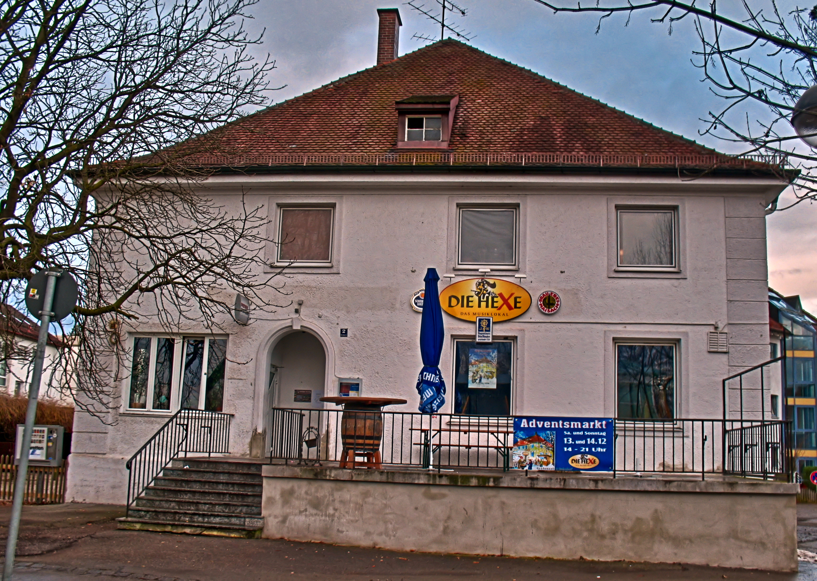 Deutschland, Bayern, Gröbenzell, ehemalige Bahnhofswirtschaft, heute das Musiklokal "Die Hexe"